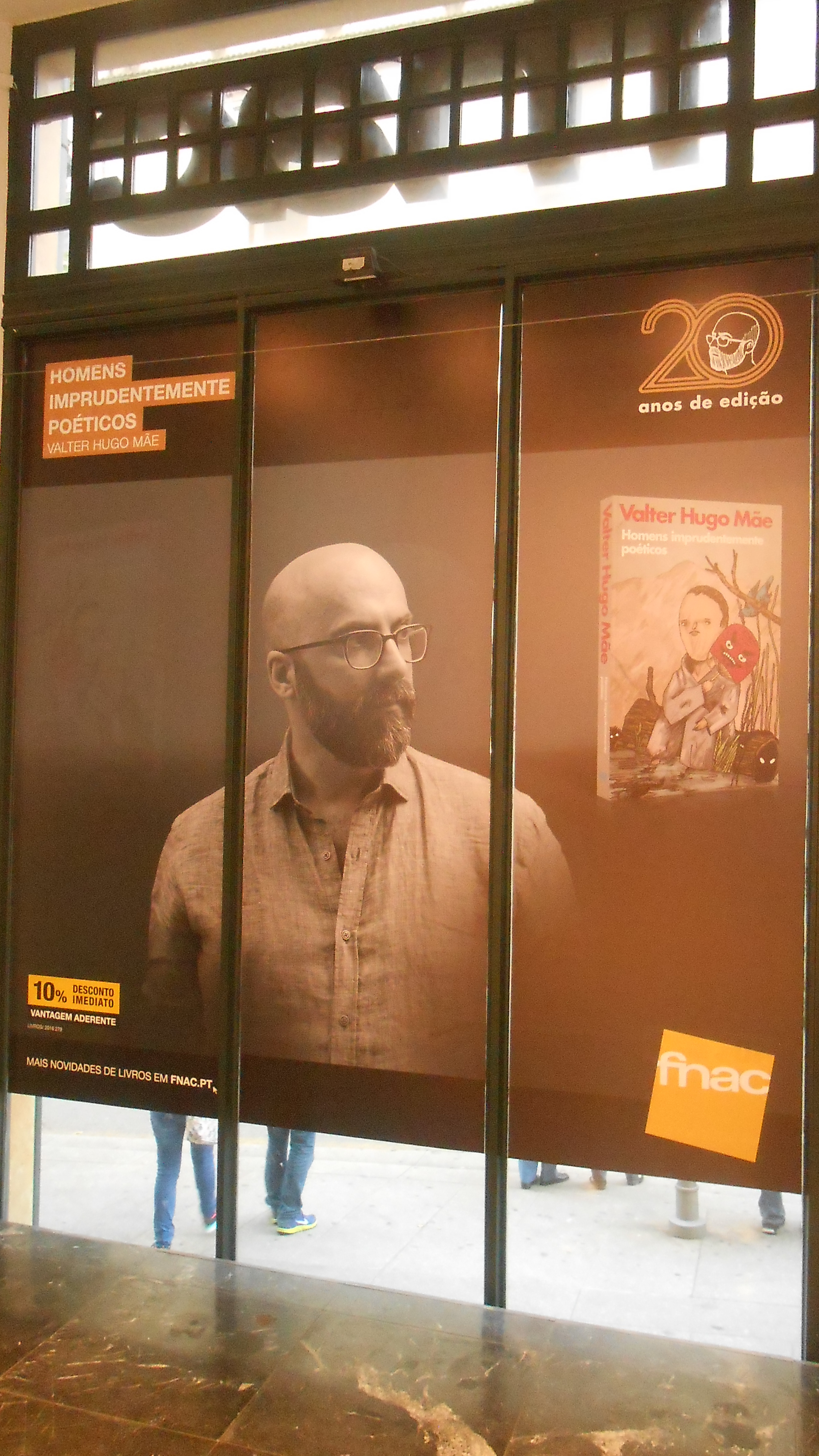 Werbetafel für das neue Buch von Valter Hugo Mãe in der FNAC-Filiale Santa Catarina in Porto, gesehen am 29. Oktober 2016.